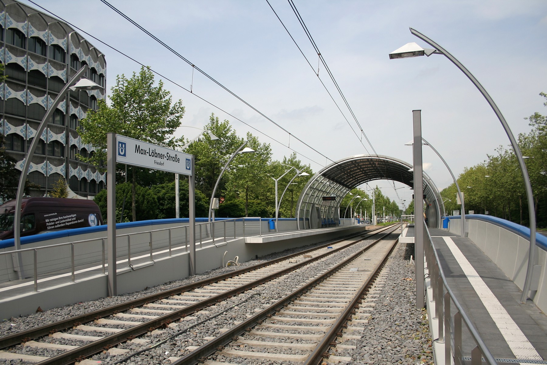 Stadtbahnhaltestelle Max-Löbner-Straße/Friesdorf in Bonn